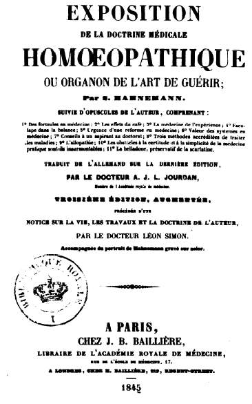 Couverture de Exposition de la doctrine médicale homoeopathique, ou Organon de l'art de guérir, S. Hahnemann, traduit de l'allemand sur la dernière édition par le Dr A.-J.-L. Jourdan, Paris : J.-B. Baillière, 1845.